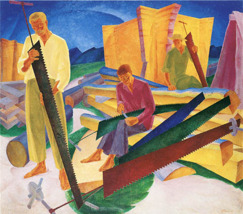 Tuning saws